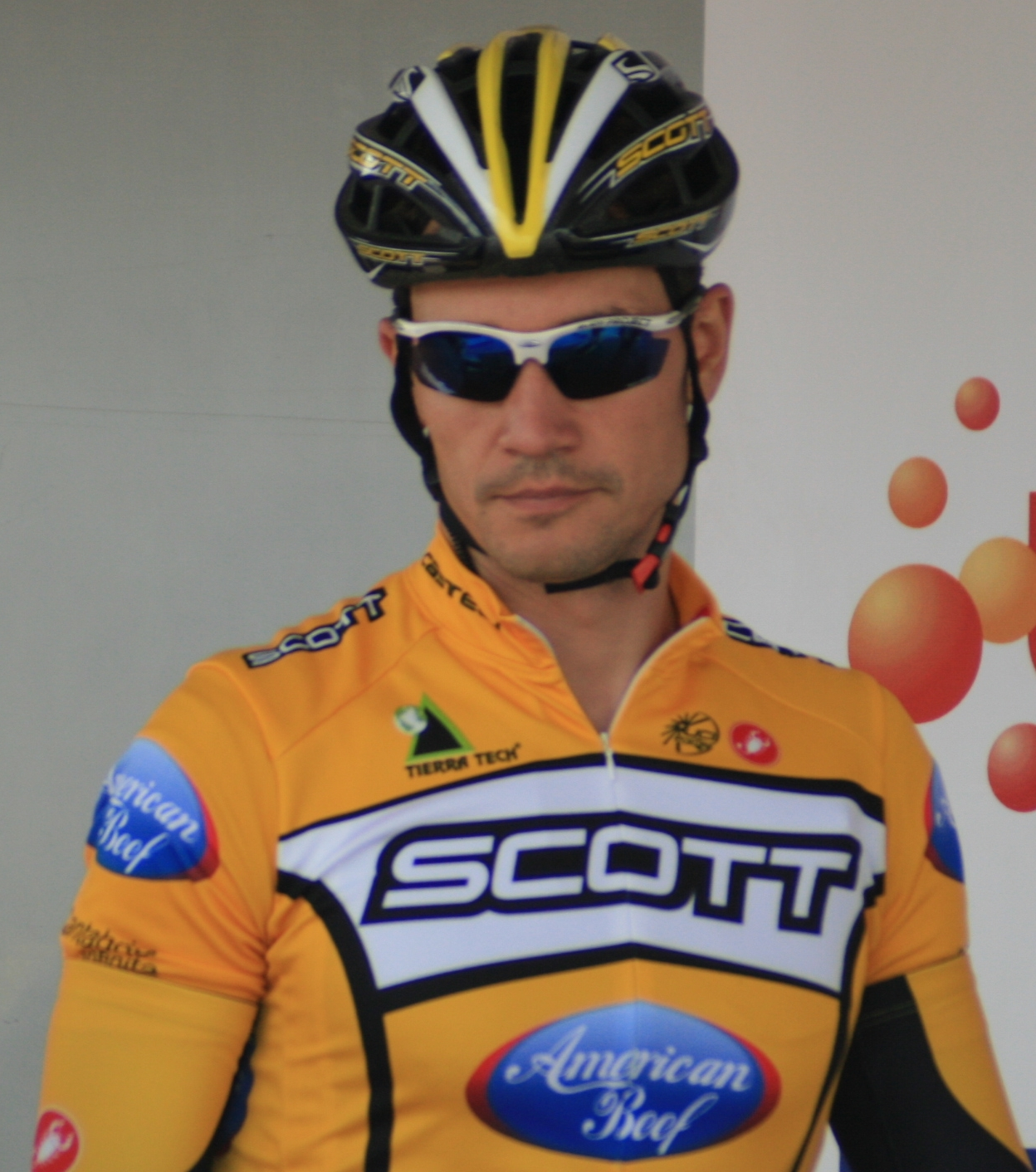 Raivis Belohvoščiks, à l'Eneco Tour 2008, à Ardooie